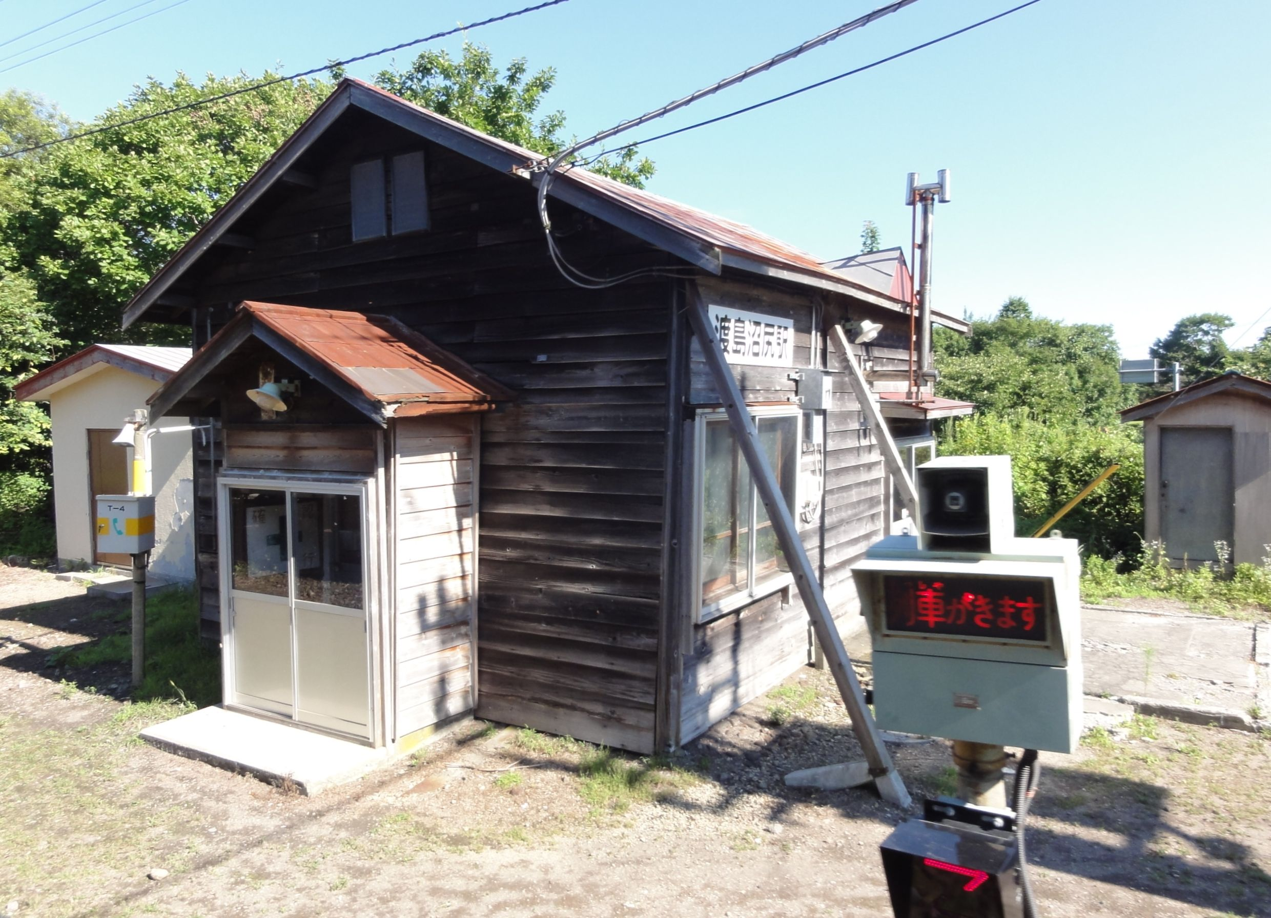 渡島沼尻駅待合室